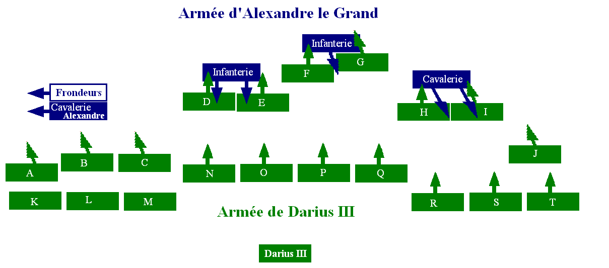 Bataille_de_Gaugamèles_4